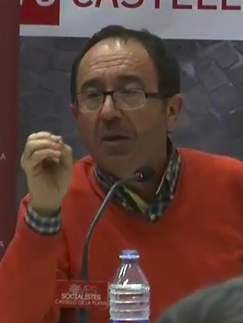 Foro Tomás Meabe organizado por Juventudes Socialistas de Castellón de la Plana sobre el Tratado Transatlántico de Comercio e Inversiones entre EEUU y la Unión Europea a cargo de Juan Andrés Perelló, Diputado en el Parlamento Europeo por el PSOE (2009-2014) y Sandra Soutto y David Hervás, economistas y miembros de ATTAC Castellón.